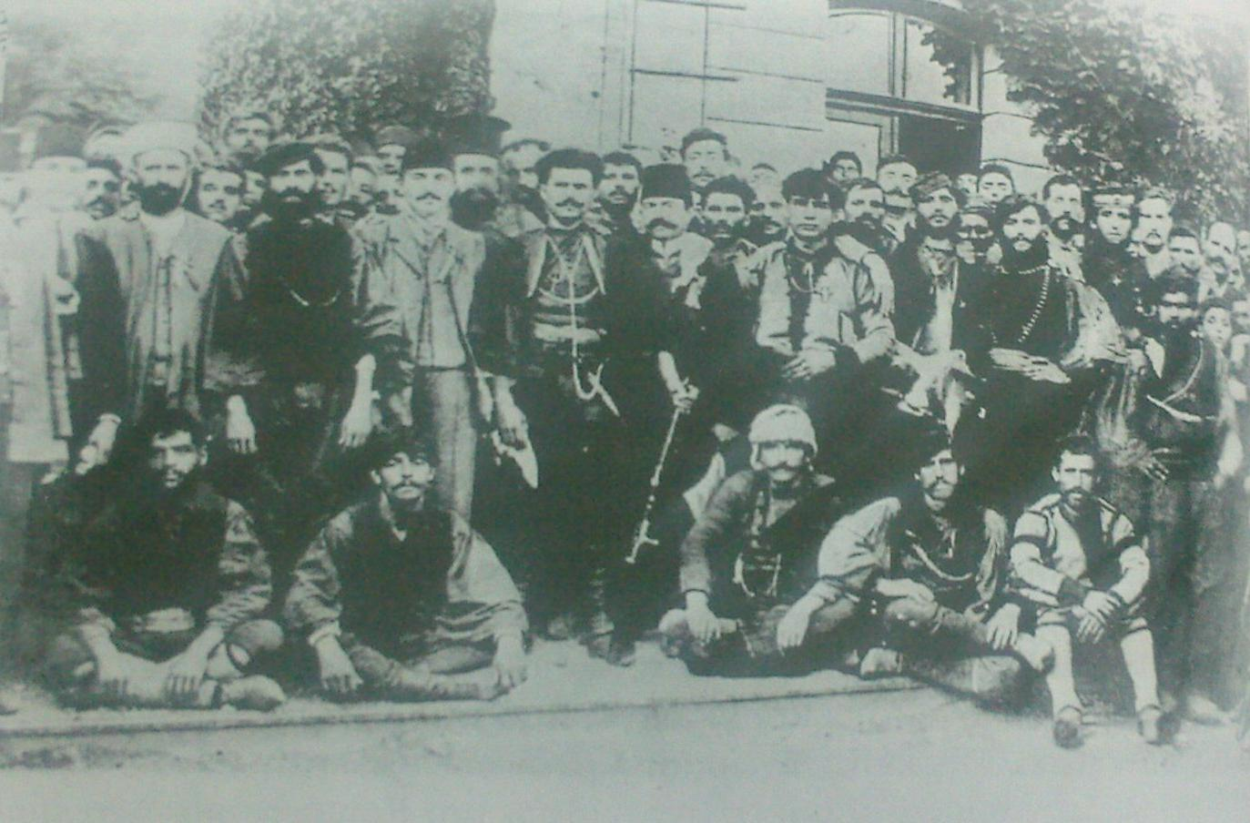 Гоно Йотов, Апостолис Матопулос и граждани в Гида след Младотурската революция.